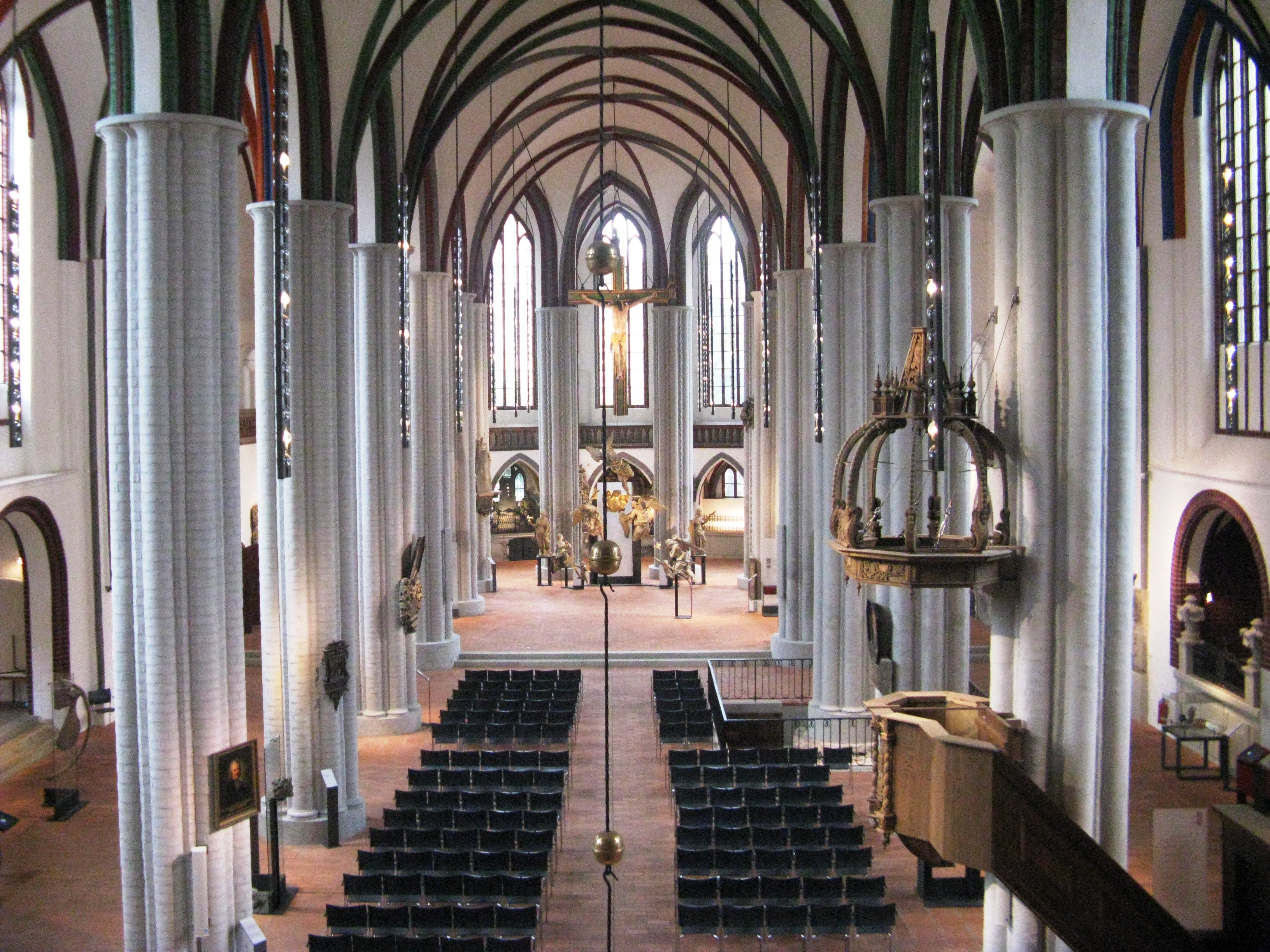 Innenansicht der Nikolaikirche im Berliner Nikolaiviertek